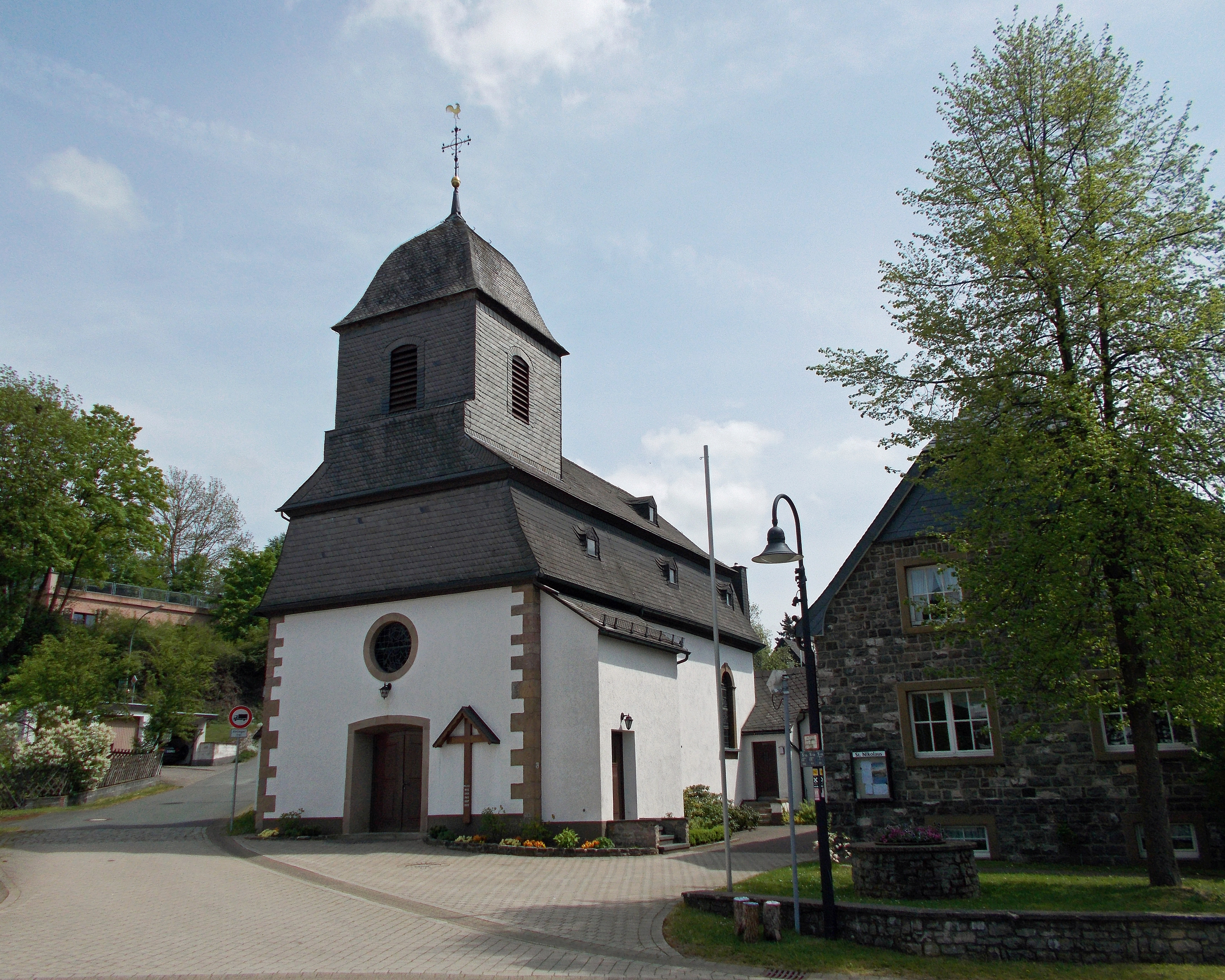 St. Nikolaus Kirche, Referinghausen